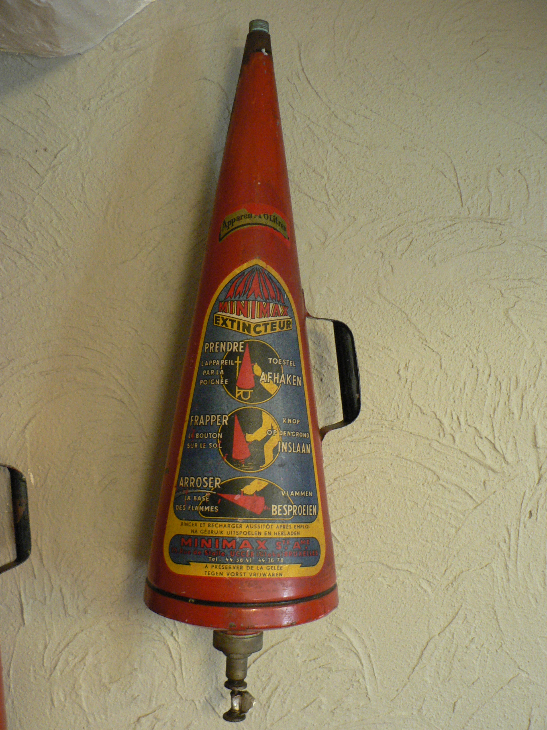 antique fire extinguisher (Location: Vinkt, Belgium